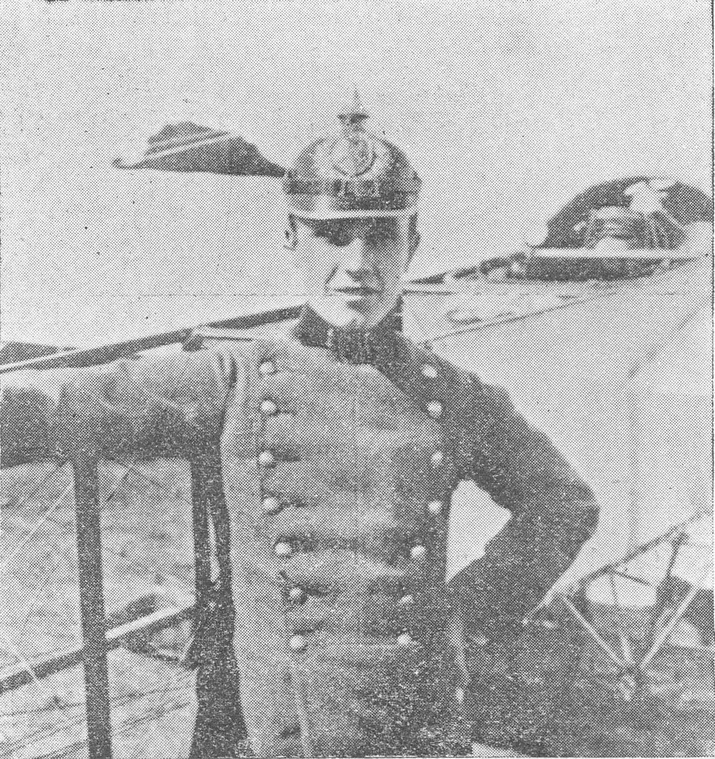 El piloto argentino Teodoro Fels al arribar a Montevideo en un histórico vuelo desde Buenos Aires el 1 de diciembre de 1912.